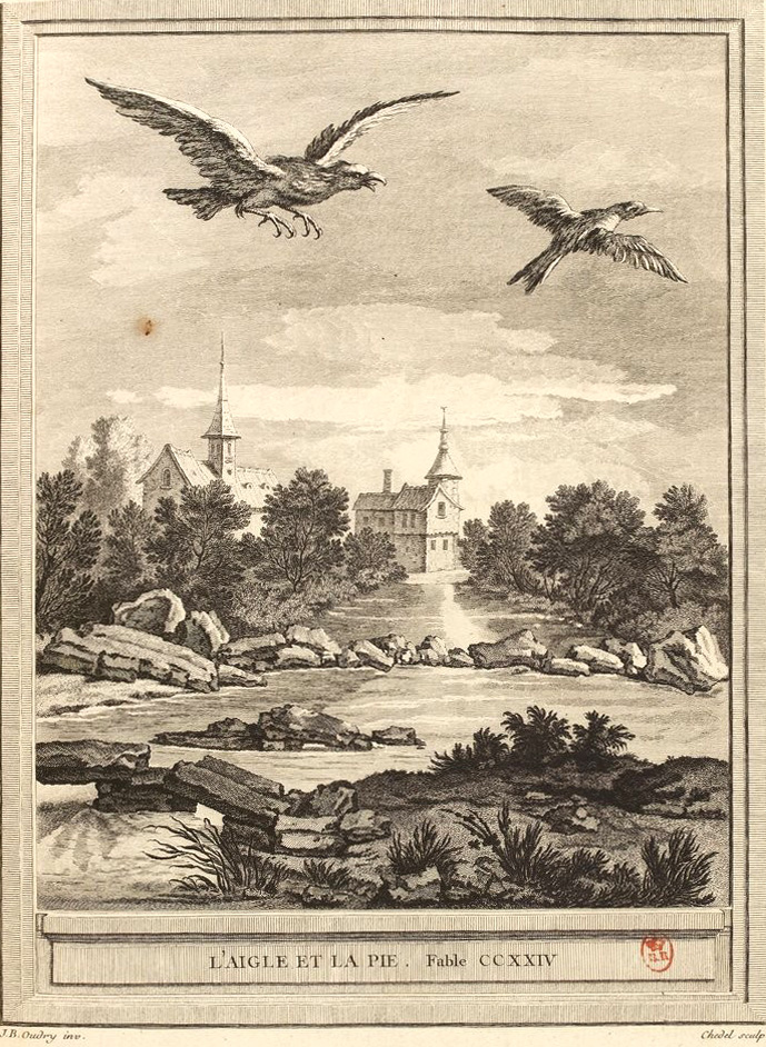 Gravure réalisée par Pierre Quentin Chedel d'après un dessin de Jean-Baptiste Oudry représentant la fable L'aigle et la pie de Jean de La Fontaine (fable 10 du livre XII). Cette gravure est parue dans l'édition complète des fables de La Fontaine, parue en quatre tomes chez l'éditeur Desaint & Saillant, rue saint Jean de Beauvais à Paris, 1755-1759.